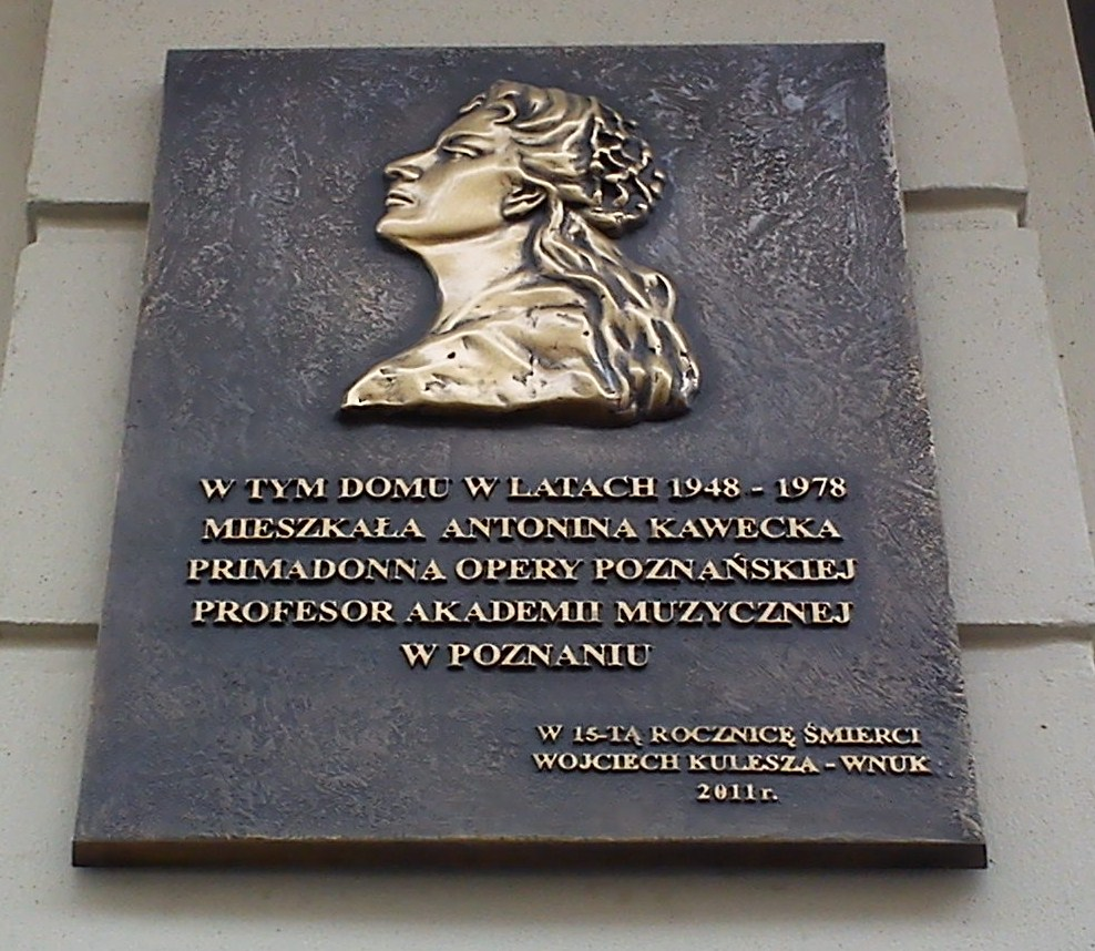 Poznań, ul. Libelta 1.